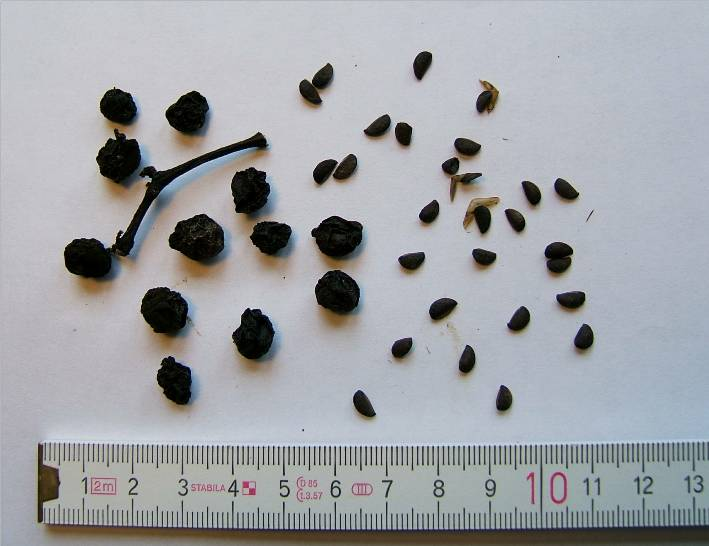 Früchte und Samen des Amur-Korkbaums (Phellodendron amurense)